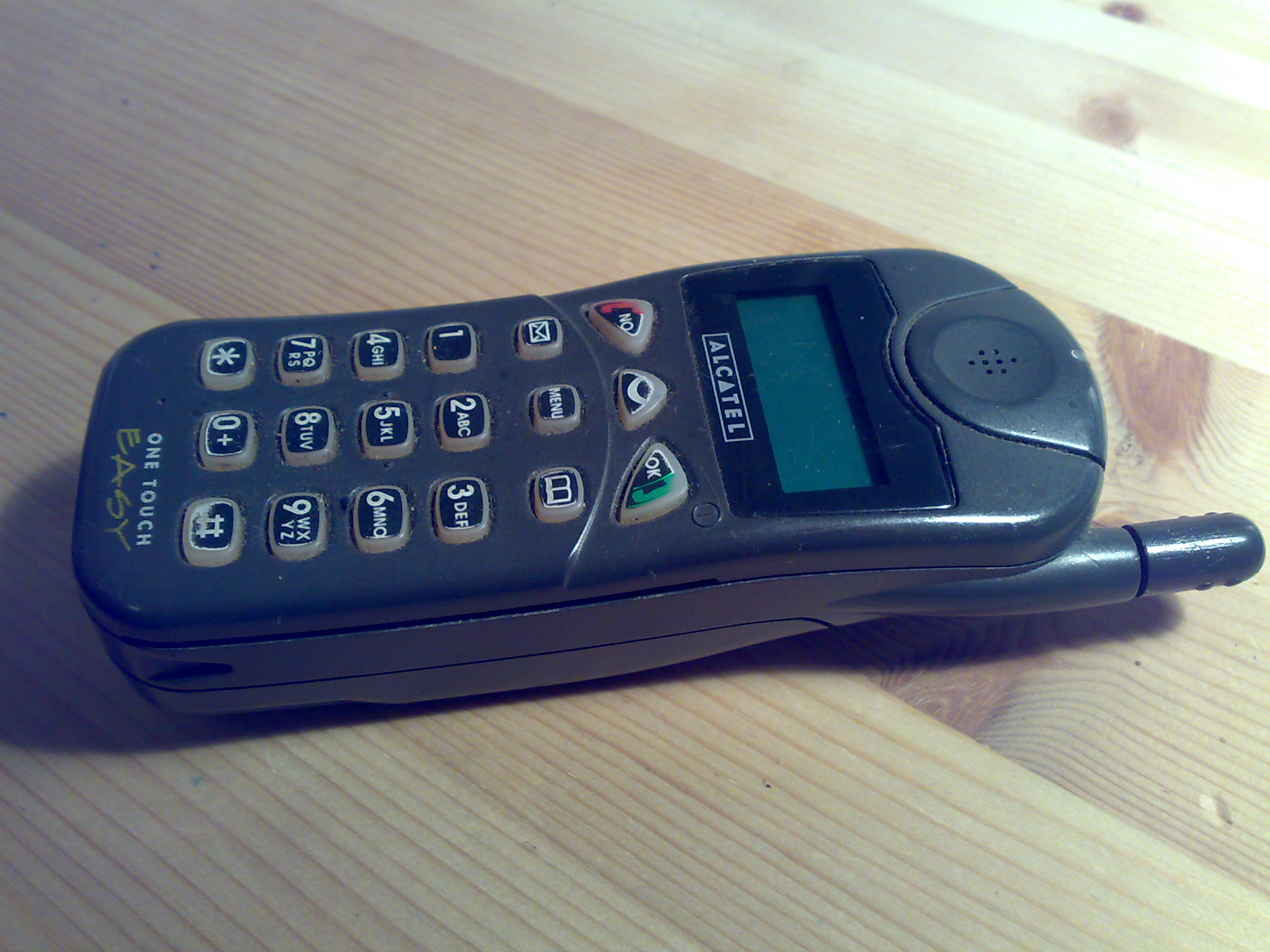 Alcatel HD1 mobile telephone mobiltelefon 1995